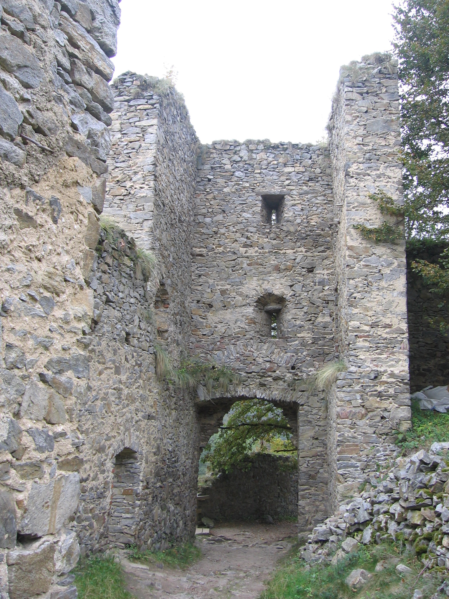 Dívčí kámen, ostrožna mezi Vltavou a Křemžským potokem, Křemže.